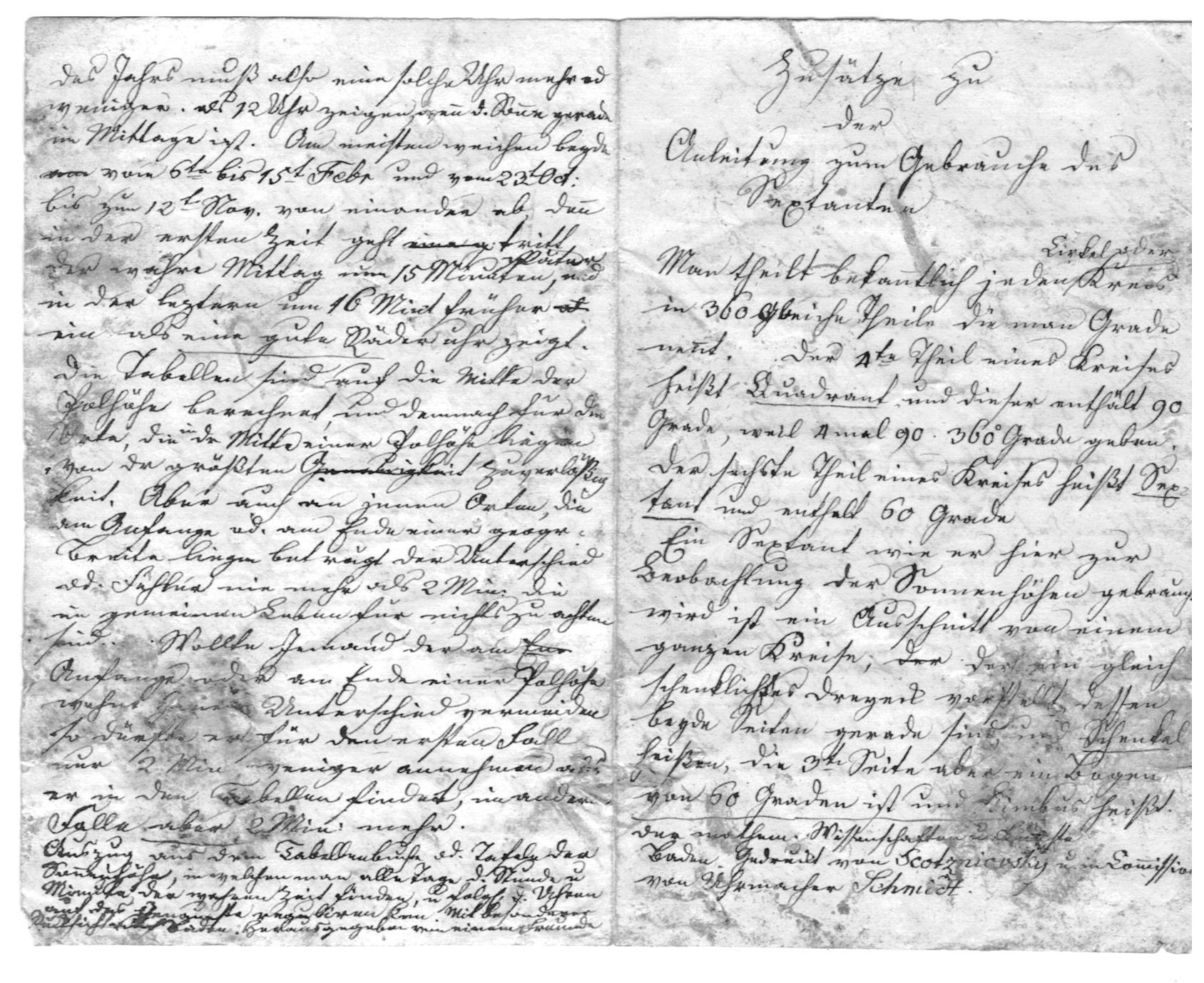 rechts: Zusätze zu der Anleitung ... - eigenhändig von G. F. Haug